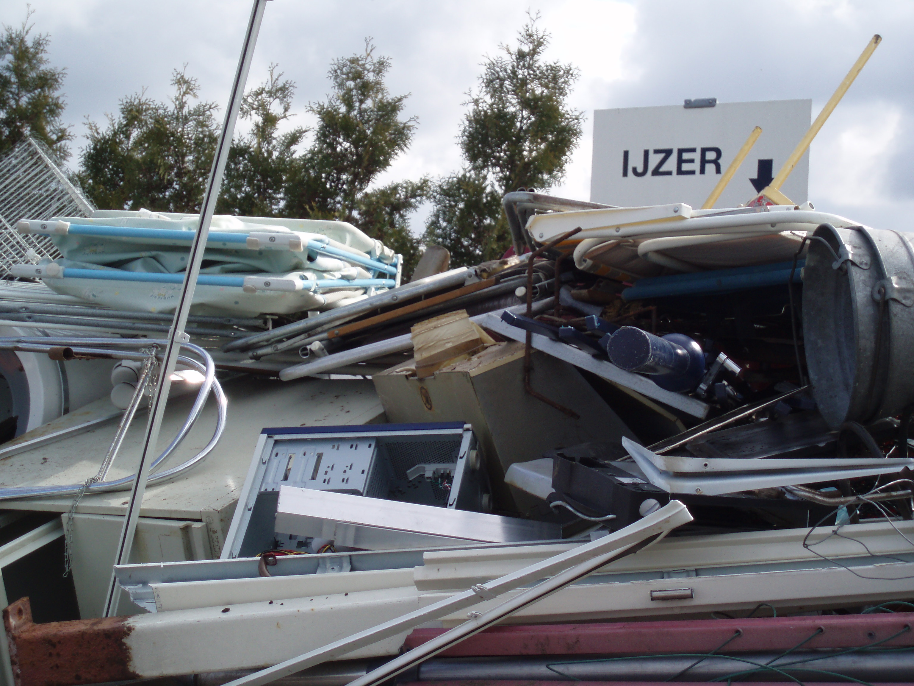 Recyclagepark Fort Verlaat in Coevorden: inzameling van oud ijzer.